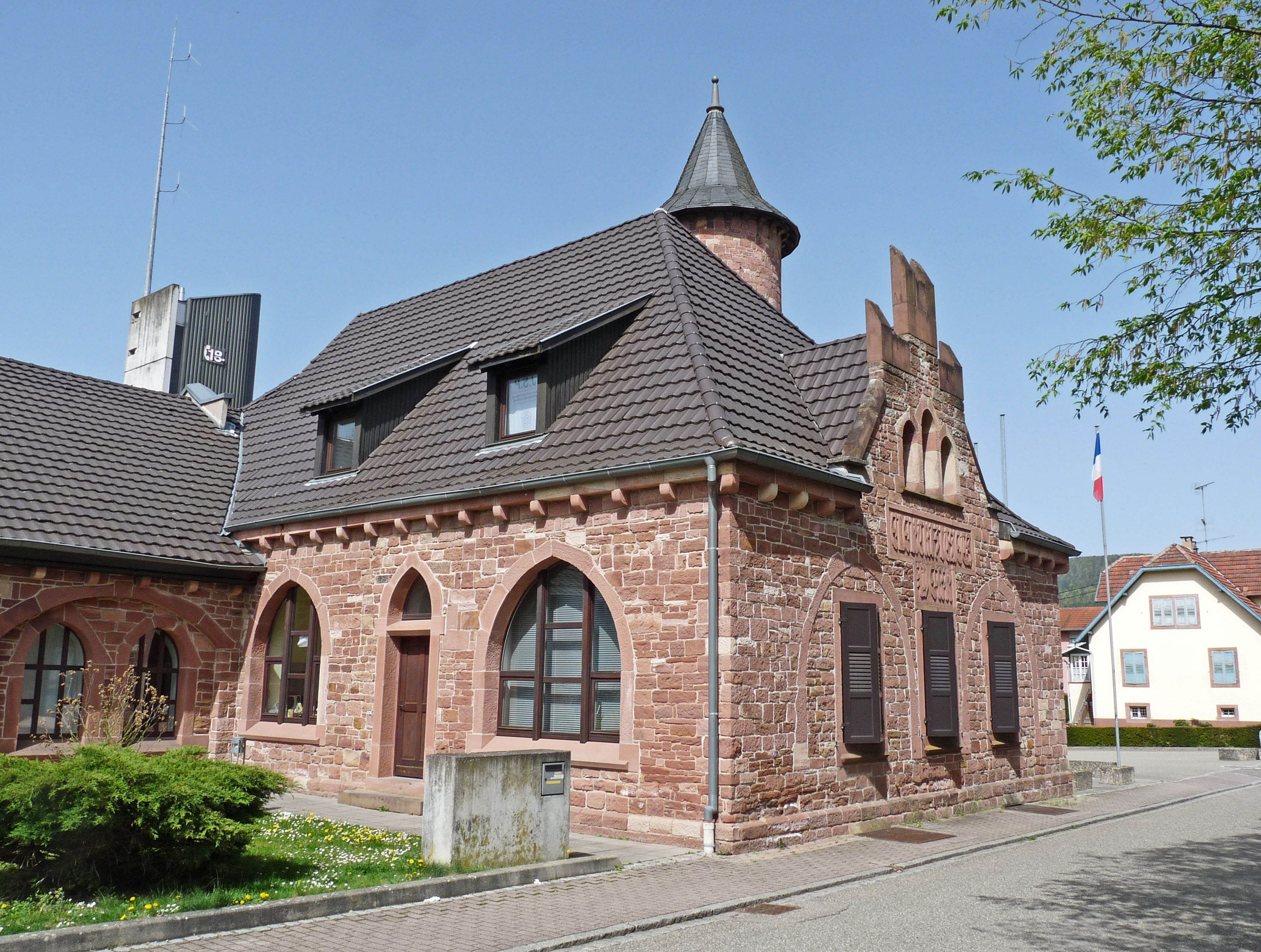 Ancienne usine d'électricité de Niederbronn (Bas-Rhin). Construite en 1900. Inscrite à l'inventaire des monuments historiques en 1991. Actuellement intégrée au centre de secours de la ville.